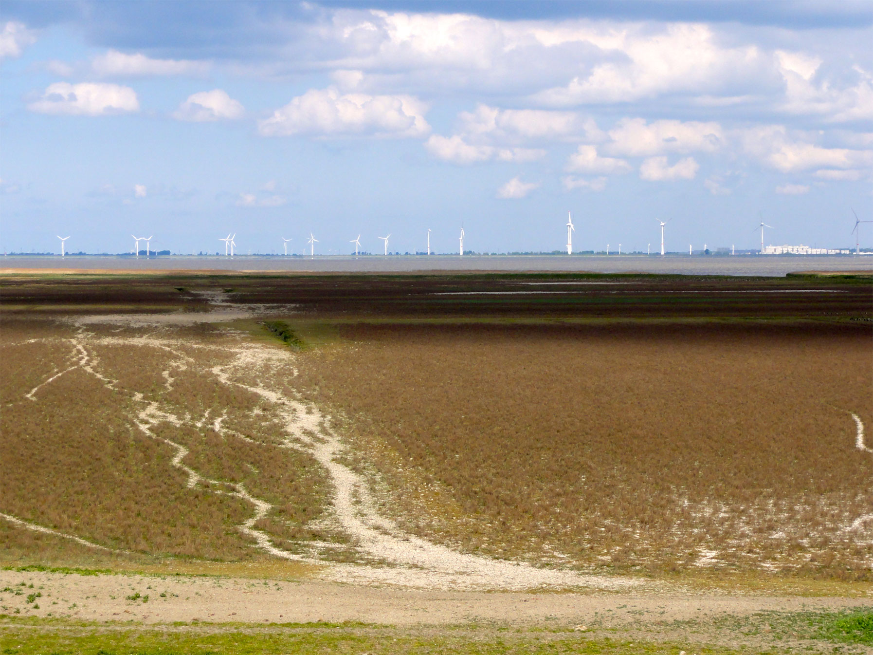 De Dollard vanaf de zeedijk met zicht op Emden